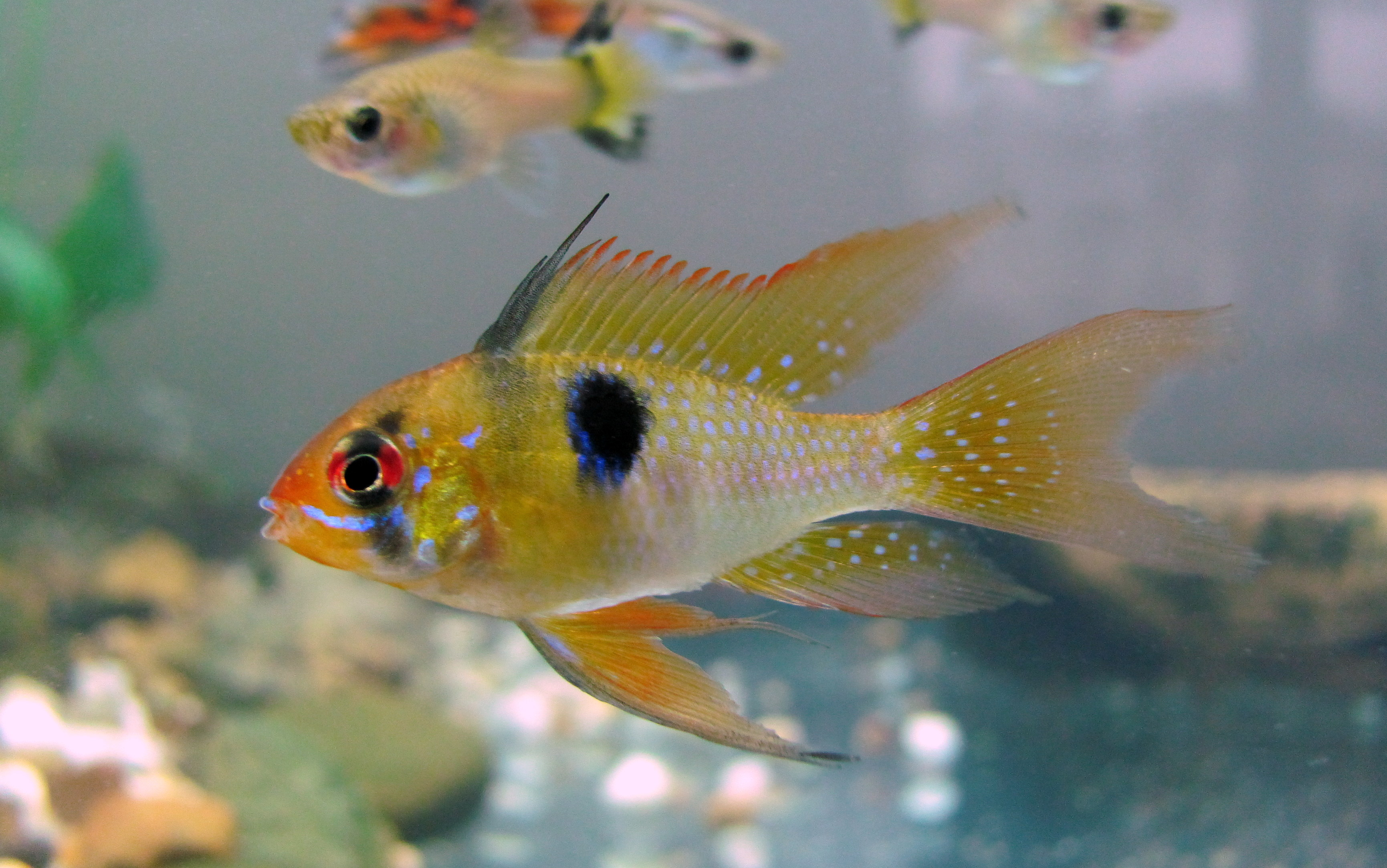 Апістограма Раміреза або цихліда-метелик